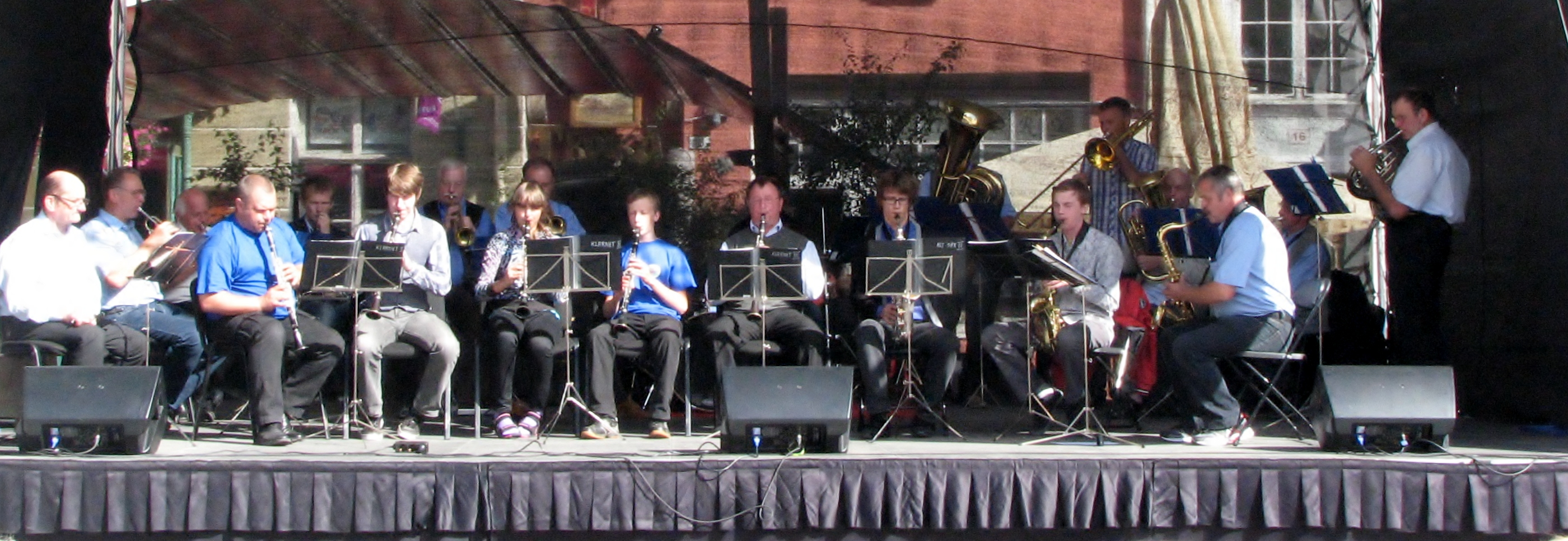 Elva puhkpilliorkester esinemas üritusel "Ava lava, Tallinn!"